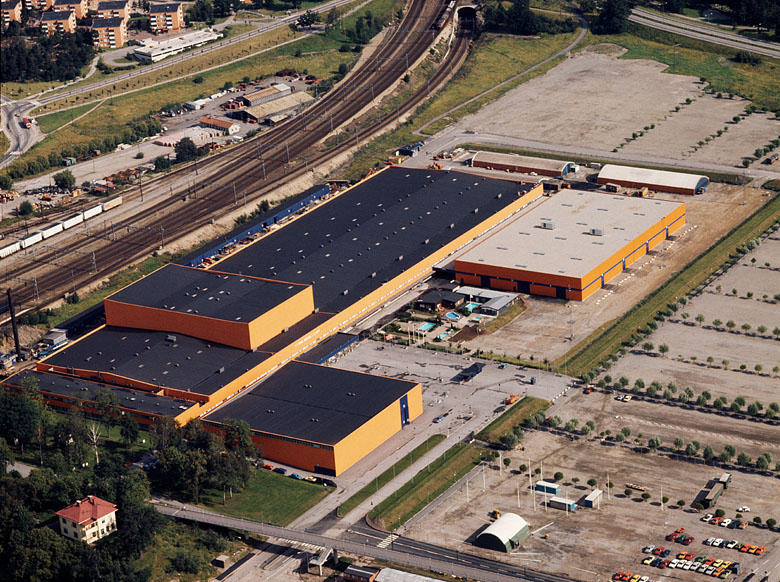 Älvsjö, Älvsjömässan. Motiv: Älvsjö Nyckelord: Flygbilder, Riksintressen Kategori: Bostadsområde, Utställningslokal Älvsjö, Älvsjömässan.